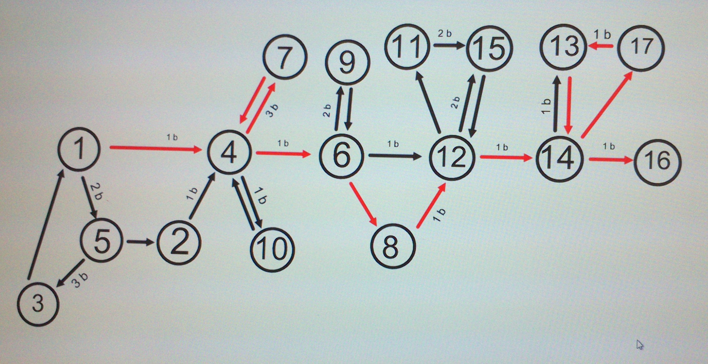 Norman A. Crowder, schéma větveného programu